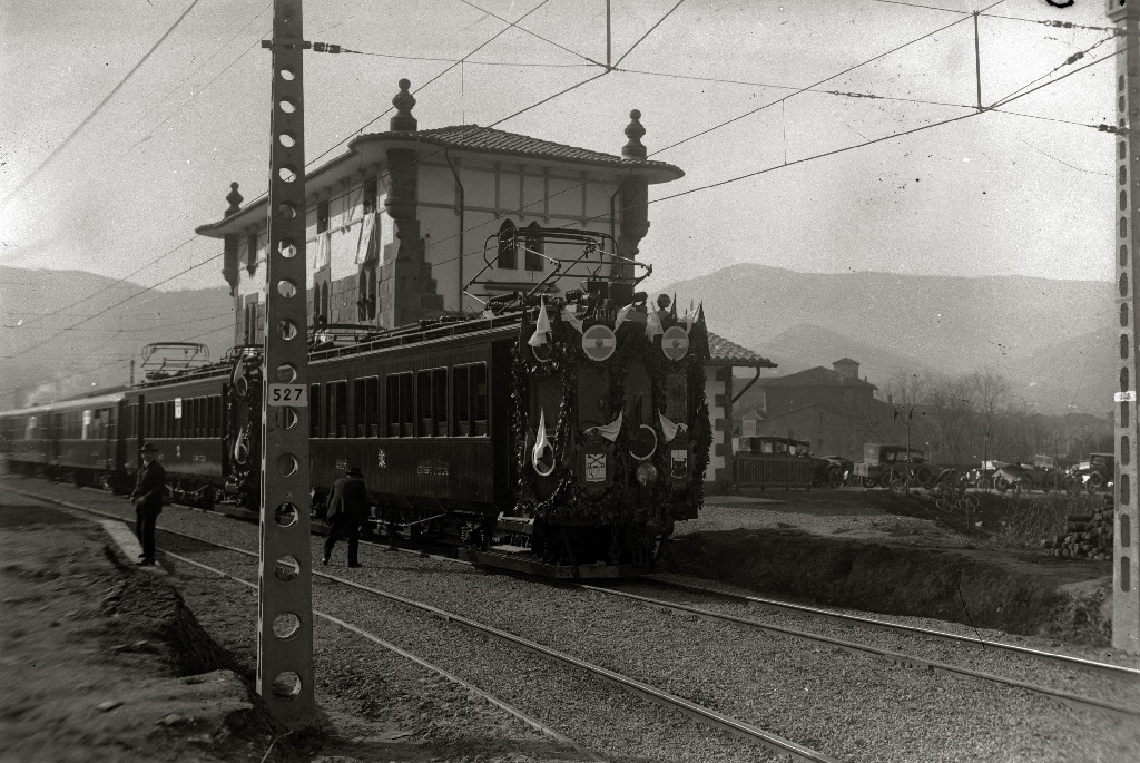 Título original: Estación de Azpeitia (4/4) Localización: Azpeitia (Guipúzcoa)